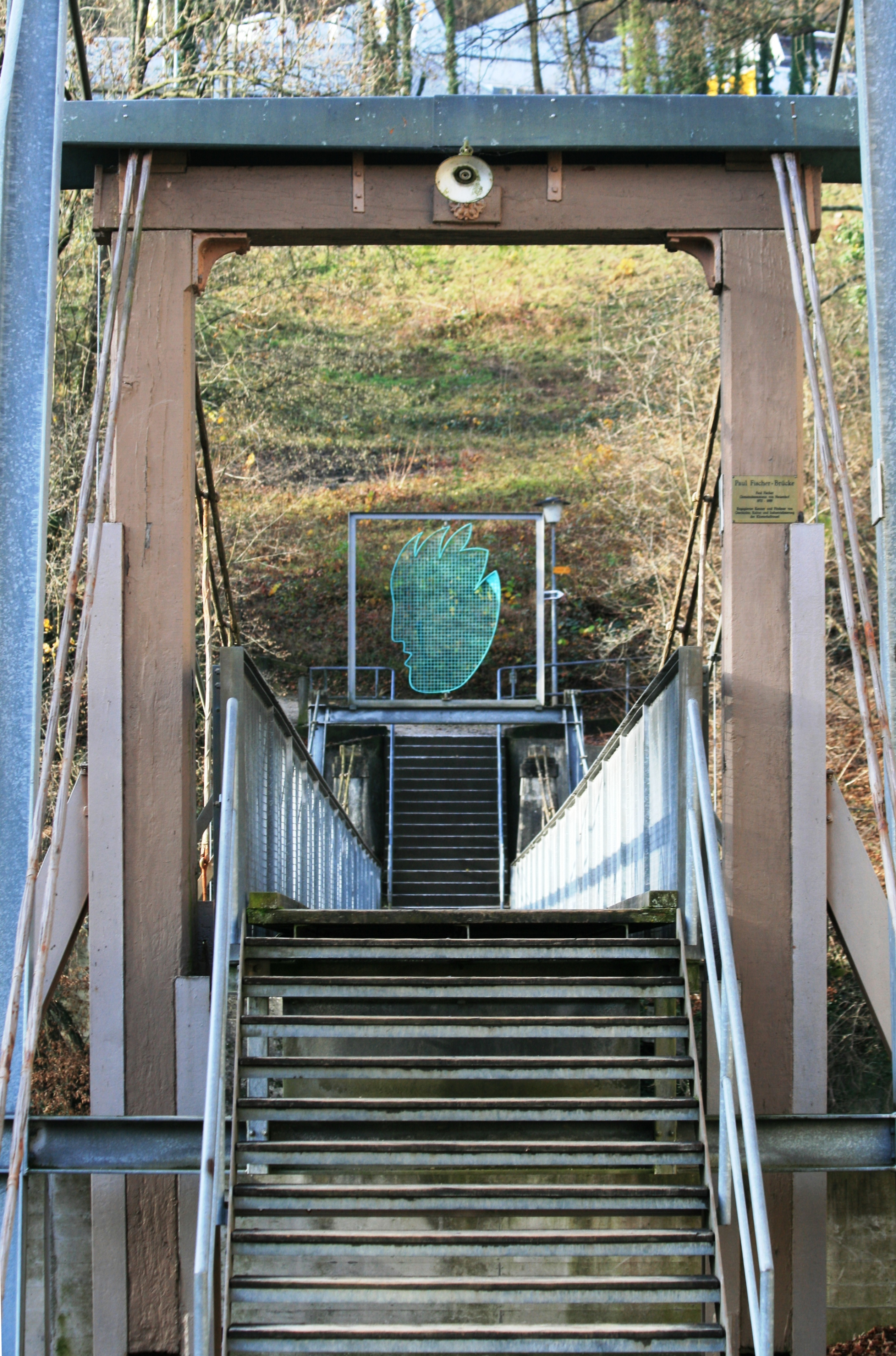 Gespräch über den Fluss von Hans Anliker auf dem Kulturweg Baden-Wettingen-Neuenhof/Gwaggelibrugg